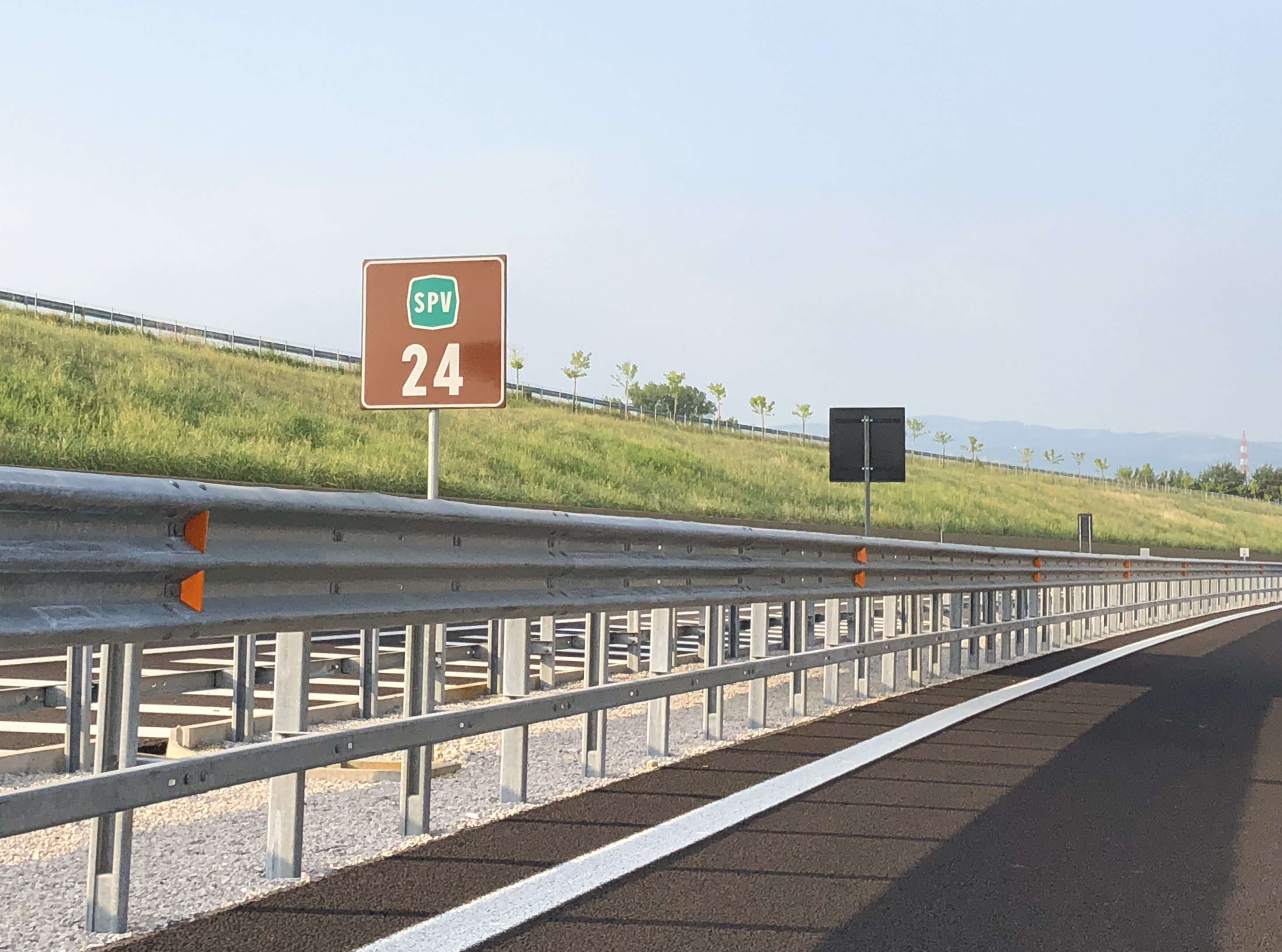 Autostrada SPV - La segnaletica è quella delle autostrade